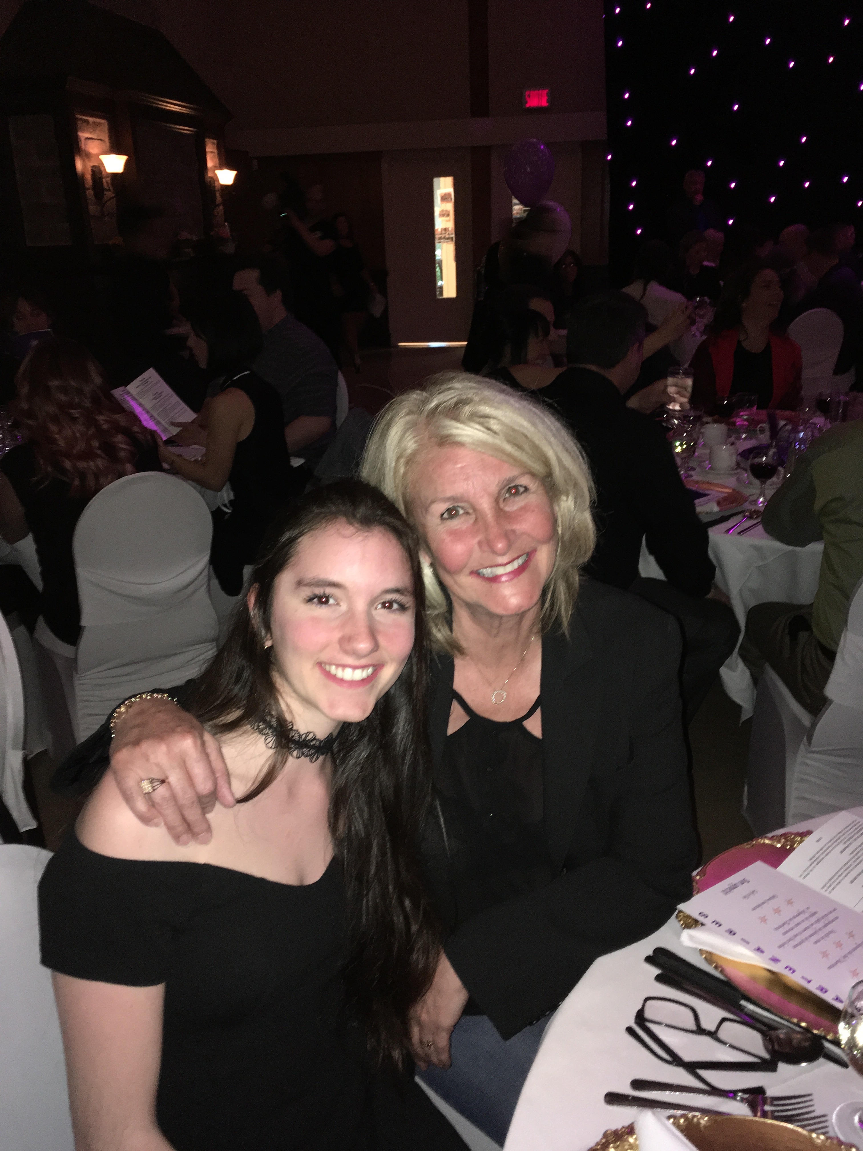 Rose-Line et Laurence Brasset